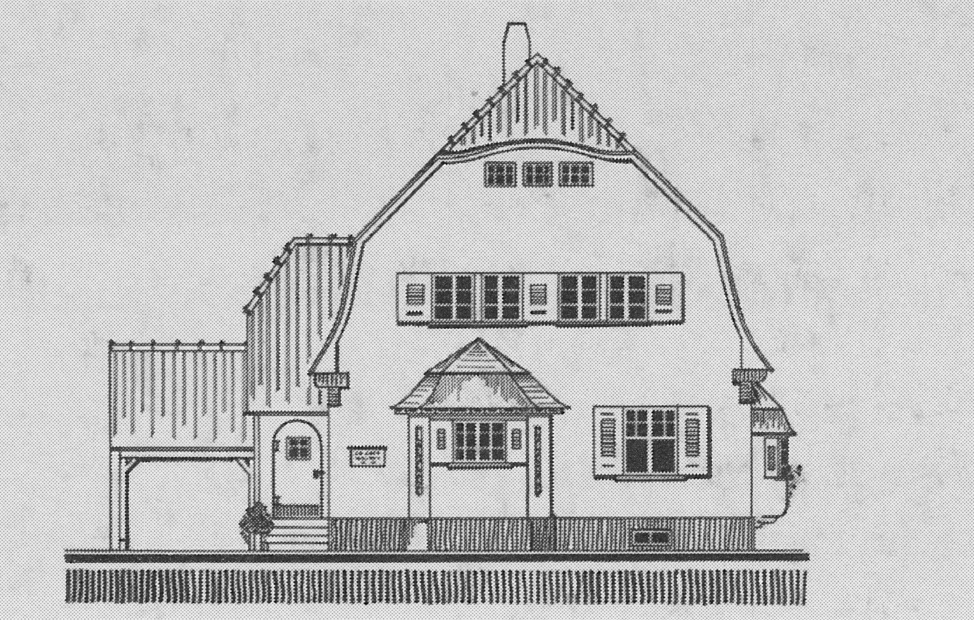 Radebeul, Freiligrathstr 6, Bauzeichnung Max Steinmetz 1909/10